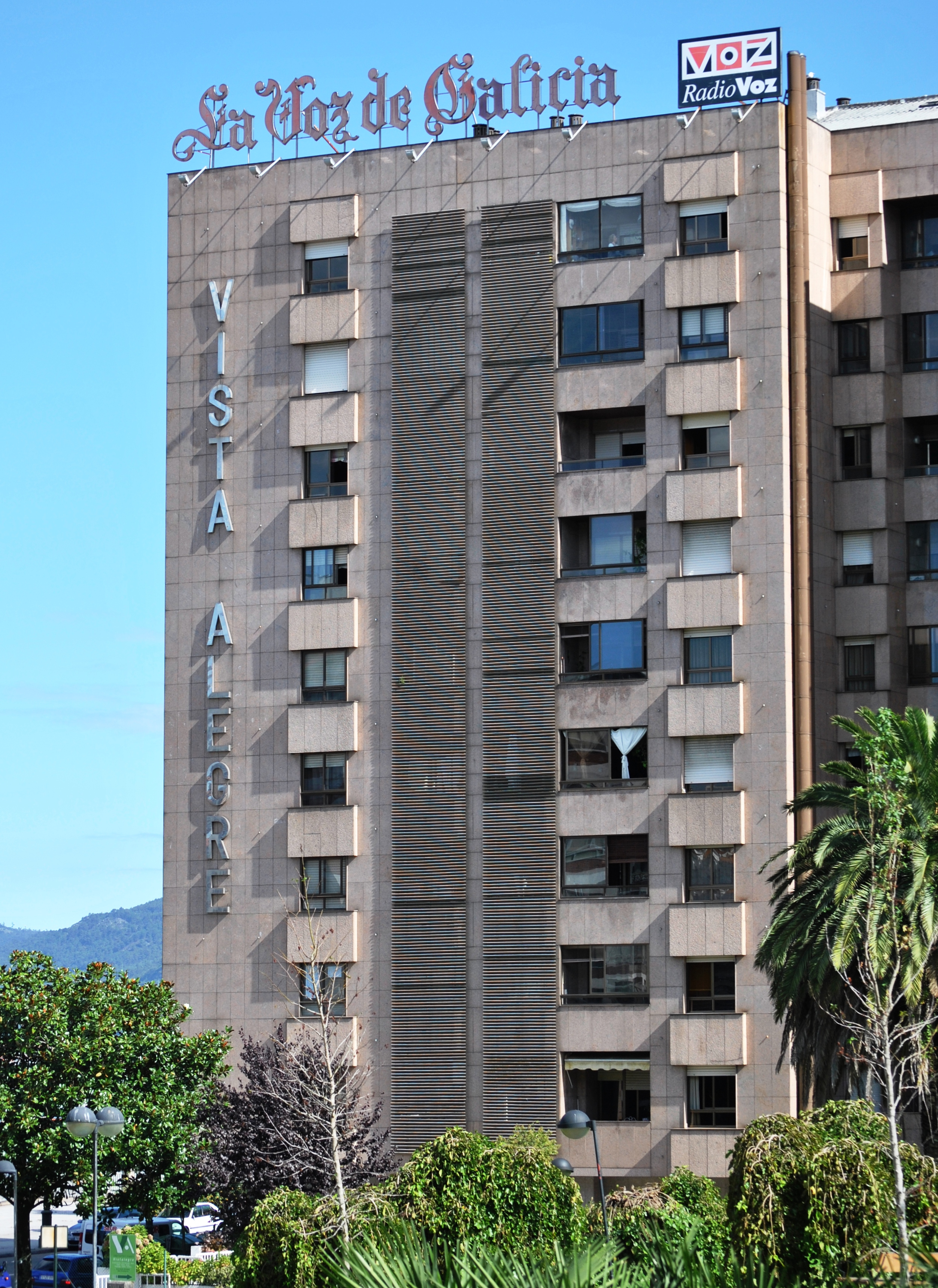 Véxase o título e as categorías.